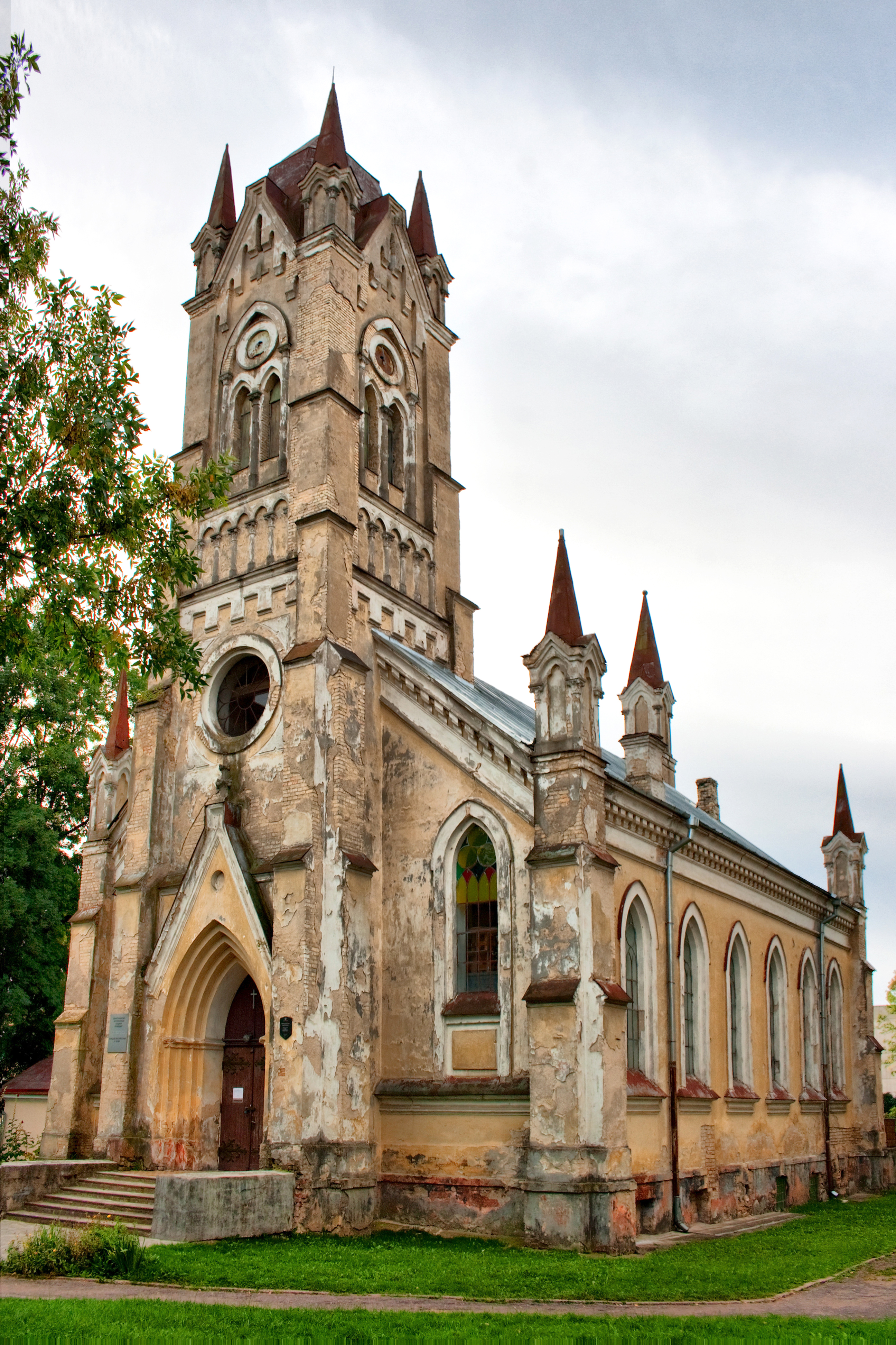 Беларуская (тарашкевіца): Будынак былой кірхі. г. Горадня This is a photo of Belarusian heritage monument. Reference number: 412Г000649 ( WLM)